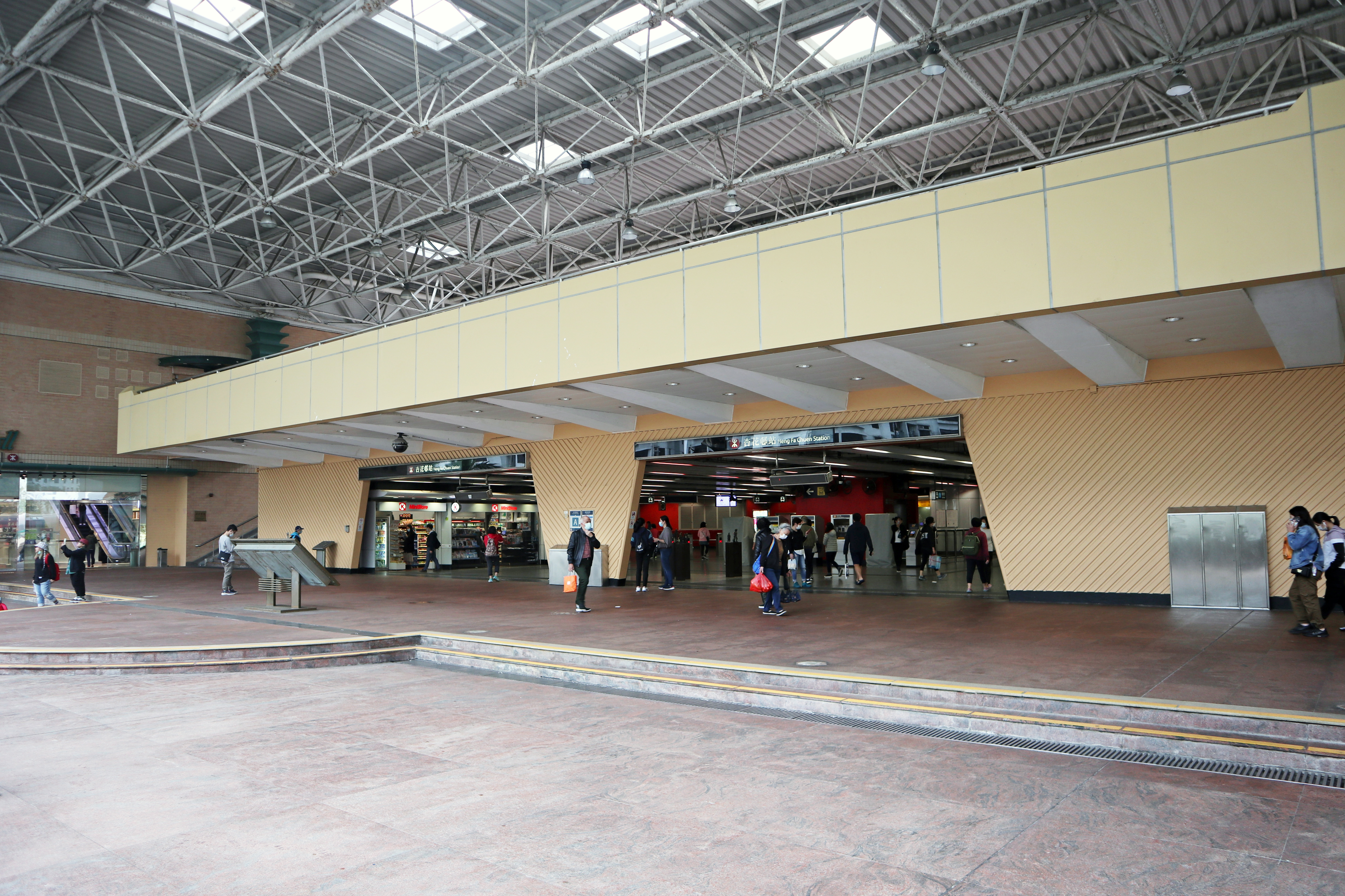 港鐵杏花邨站A出口外觀